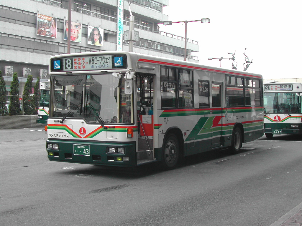 姫路市営バス時代 2002-4-8 市バスターミナルにて撮影